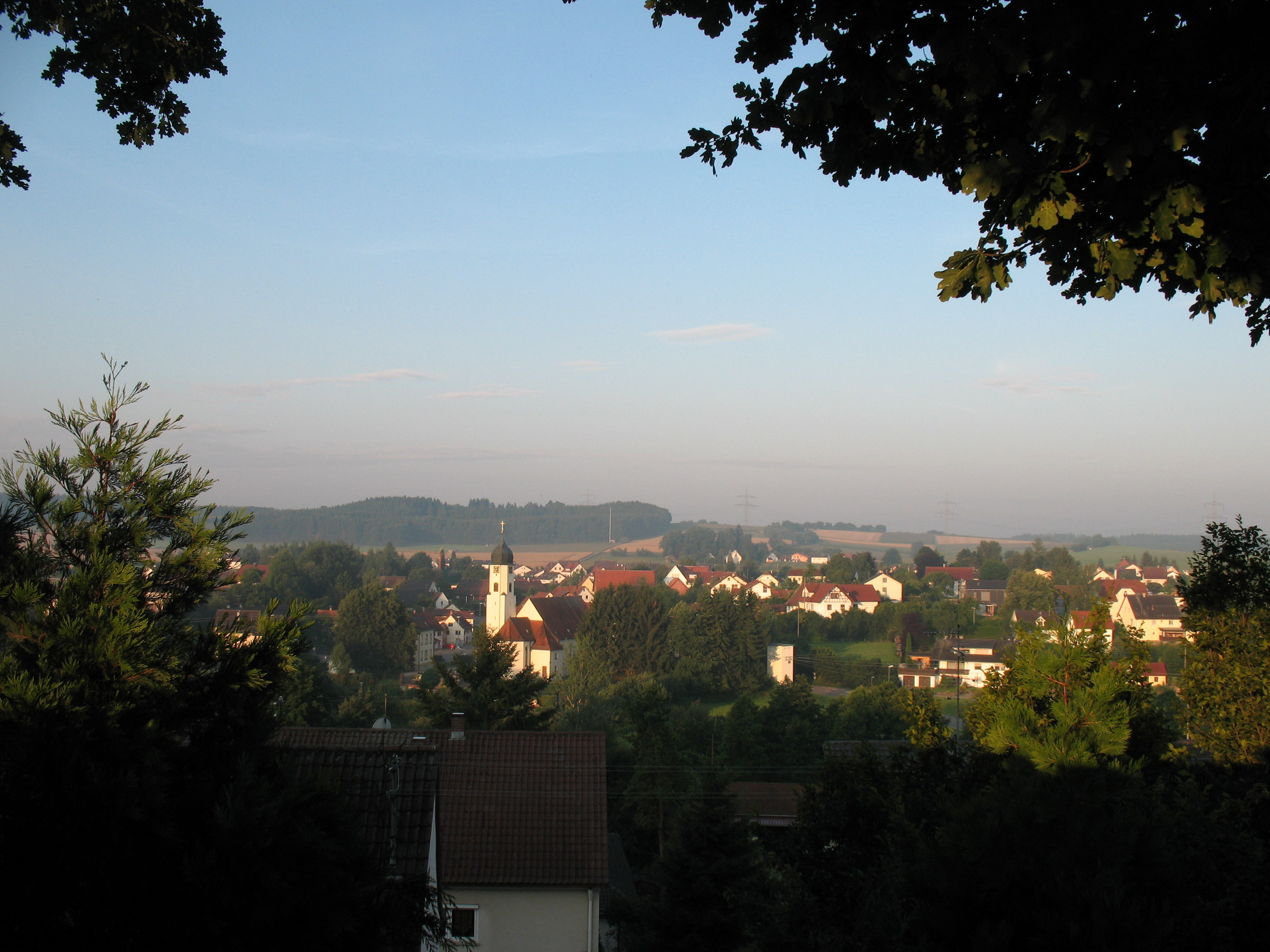 Blick von Osten auf den Maselheimer Ortskern.